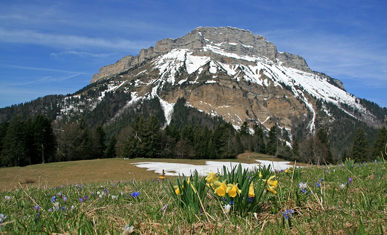 Chamechaude depuis les Emeindras